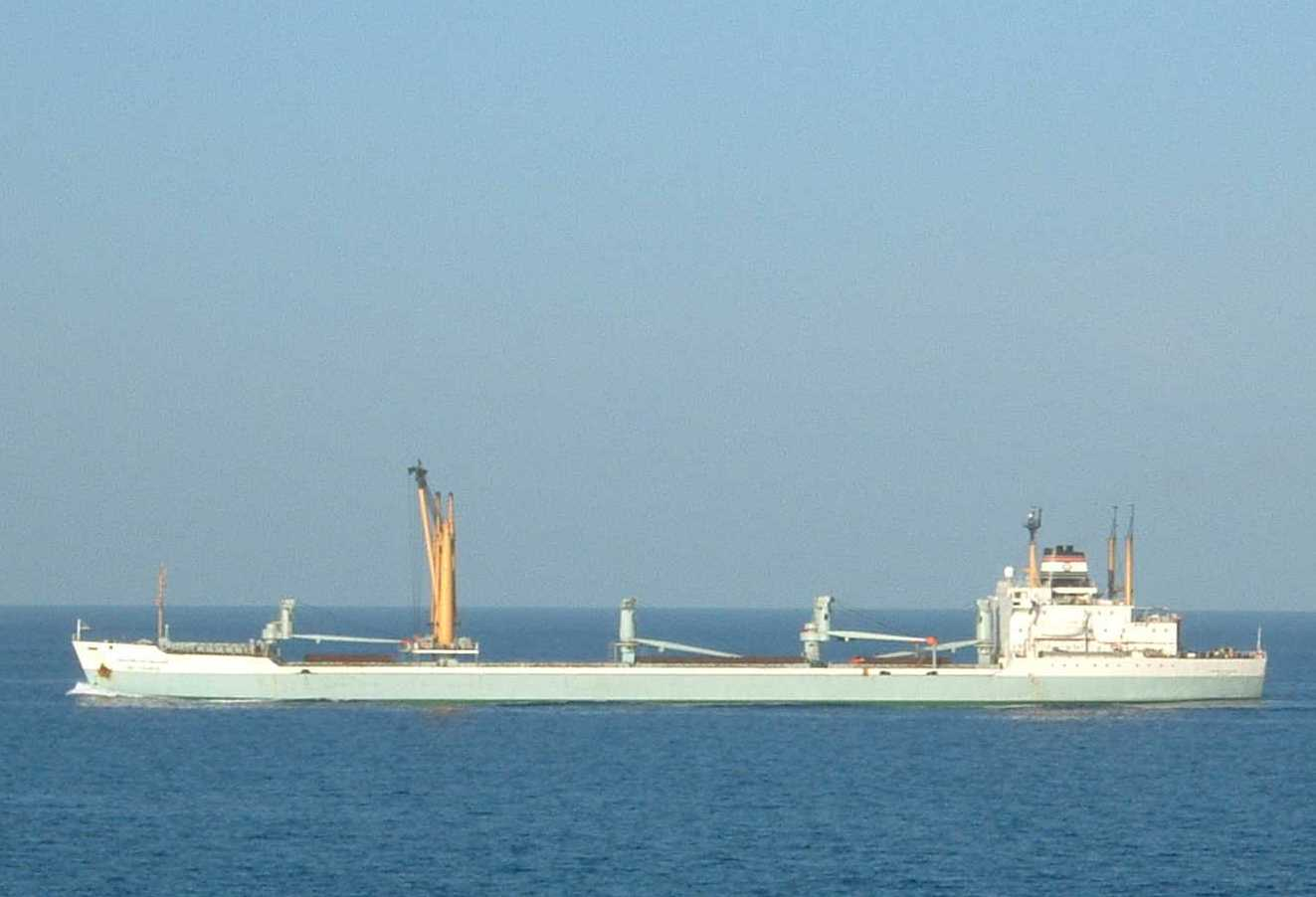 General cargo vessel at sea.